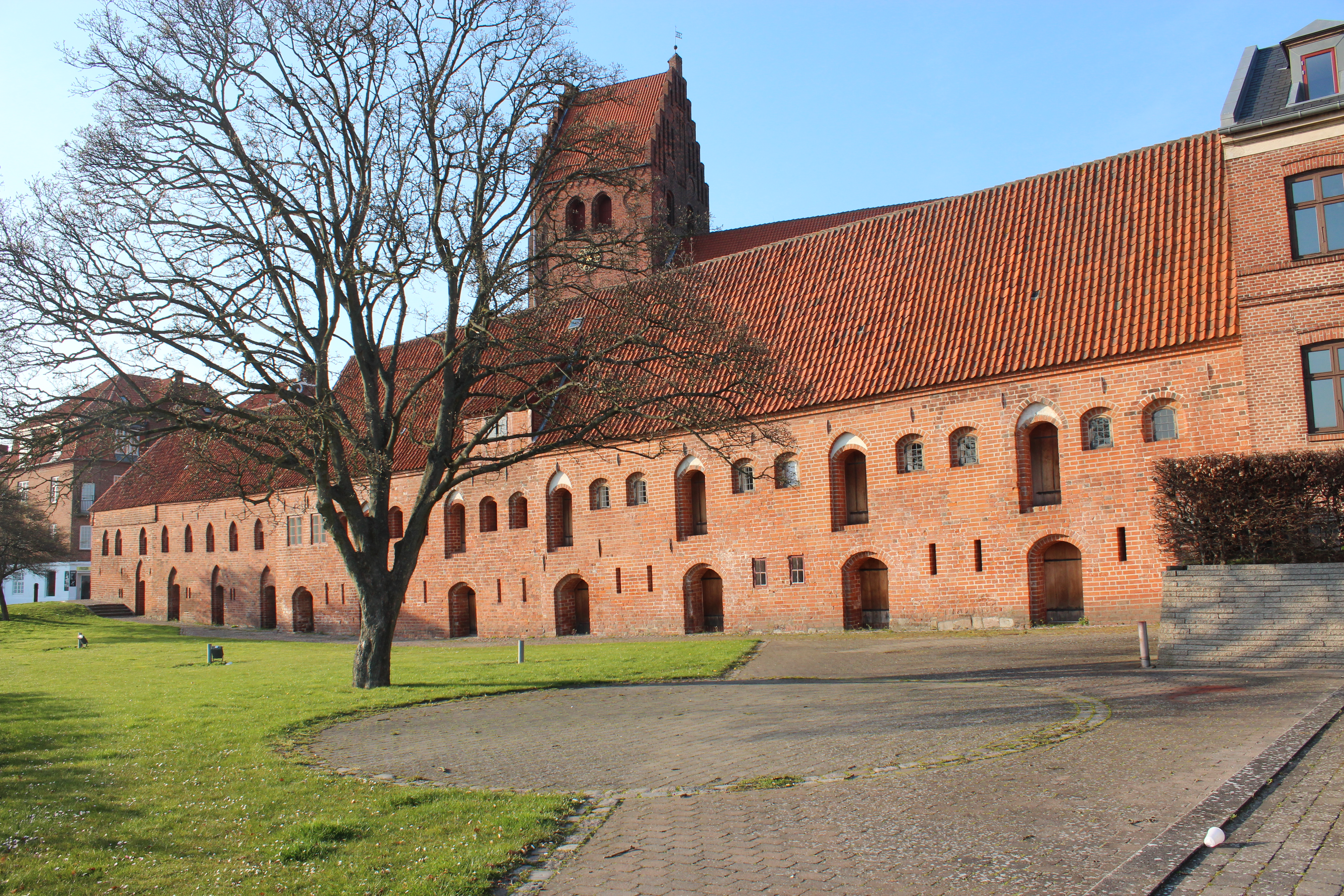 Boderne med Sankt Peder Kirke i baggrunden